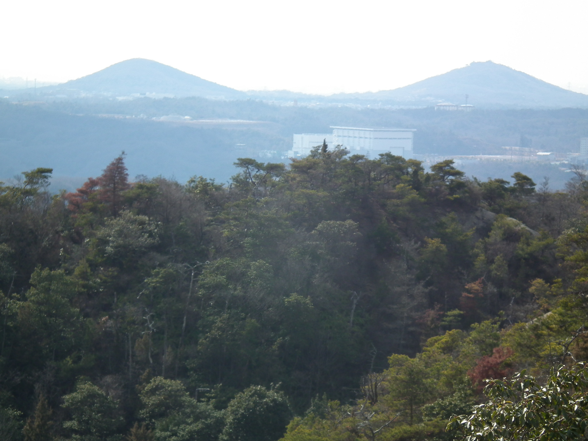 シビレ山から見る雌岡山・雄岡山